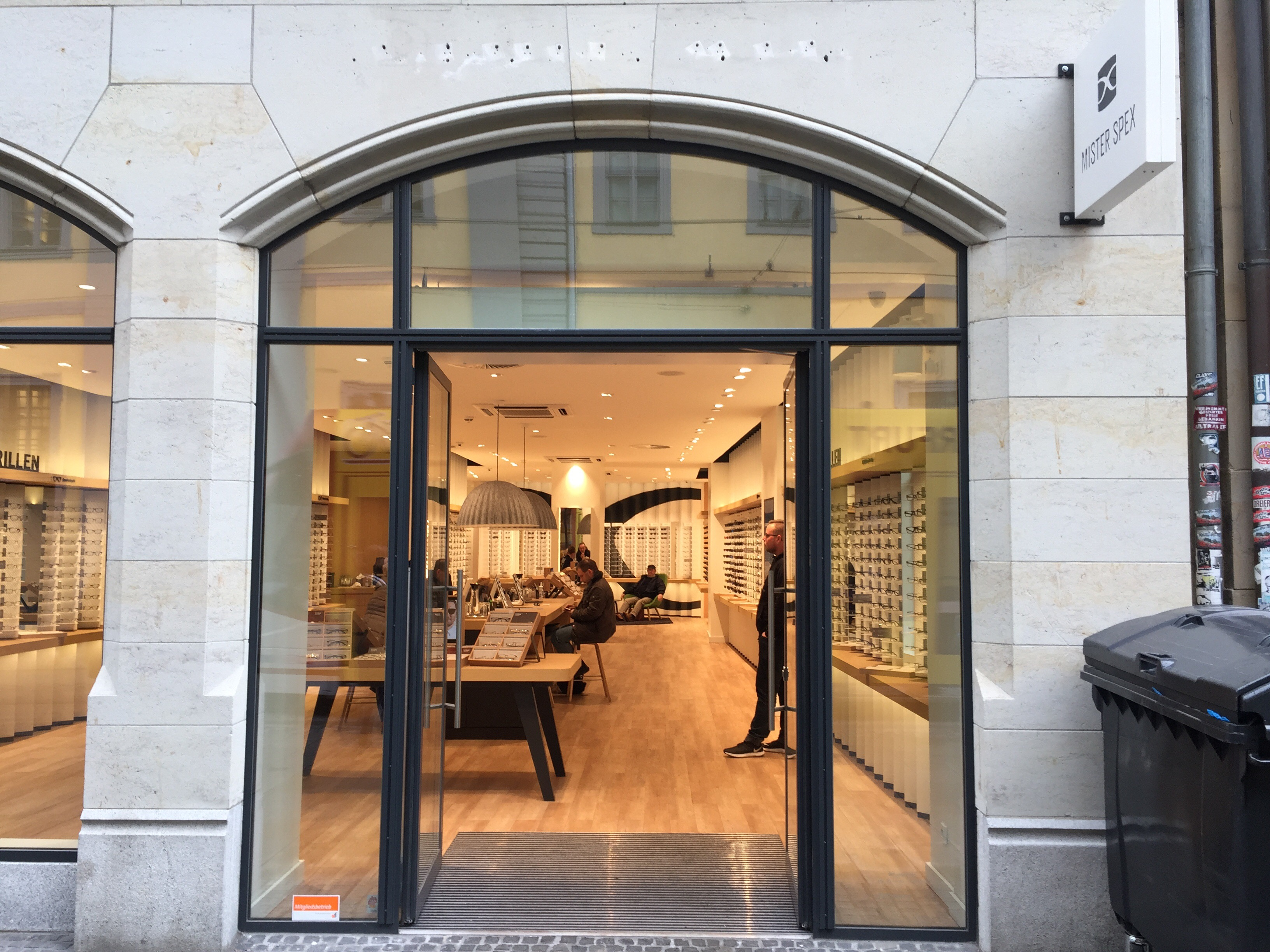 Mister Spex,Erfurt, Deutschland, February 2019